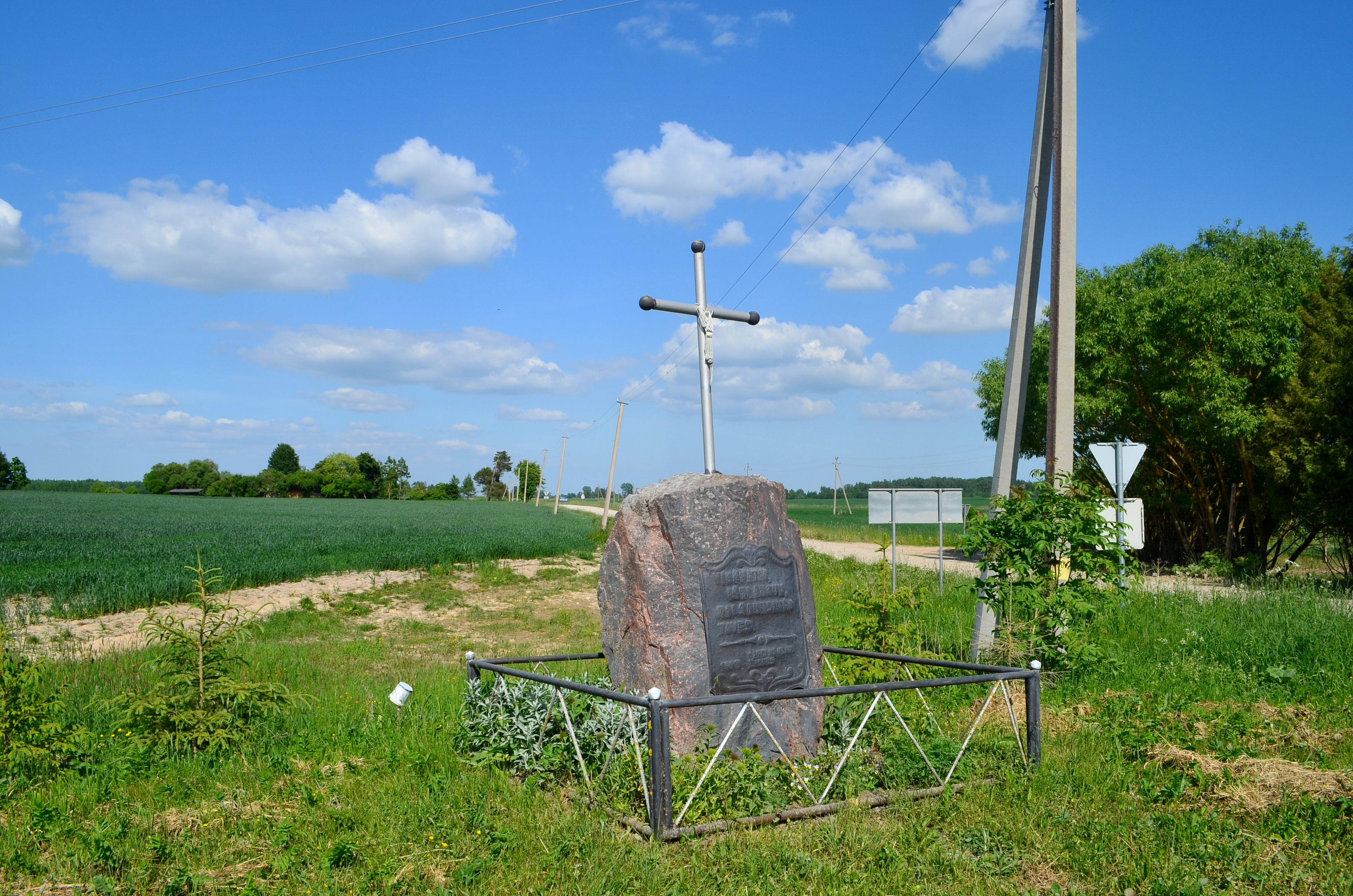 Laisvės paminklas Dameliuose, Joniškio raj.